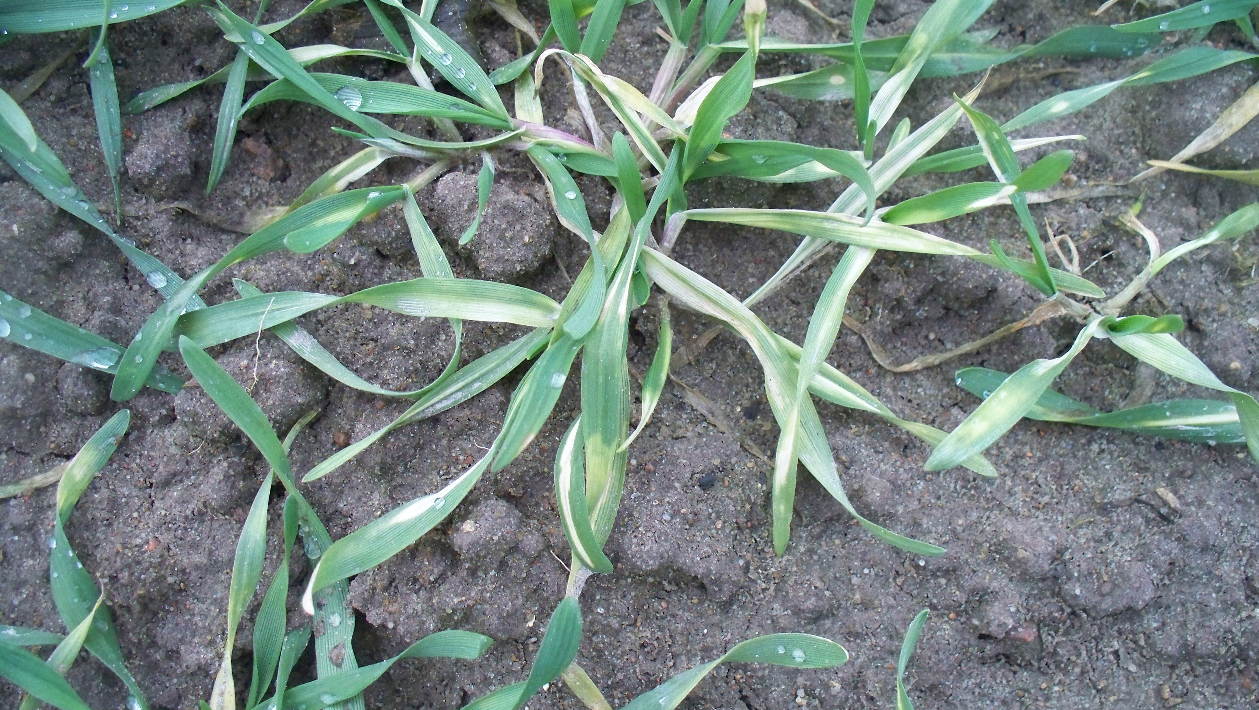 Nieszkodliwe przebarwienia na życie powstałe po zastosowaniu herbicydu opartego na prosulfokarbie